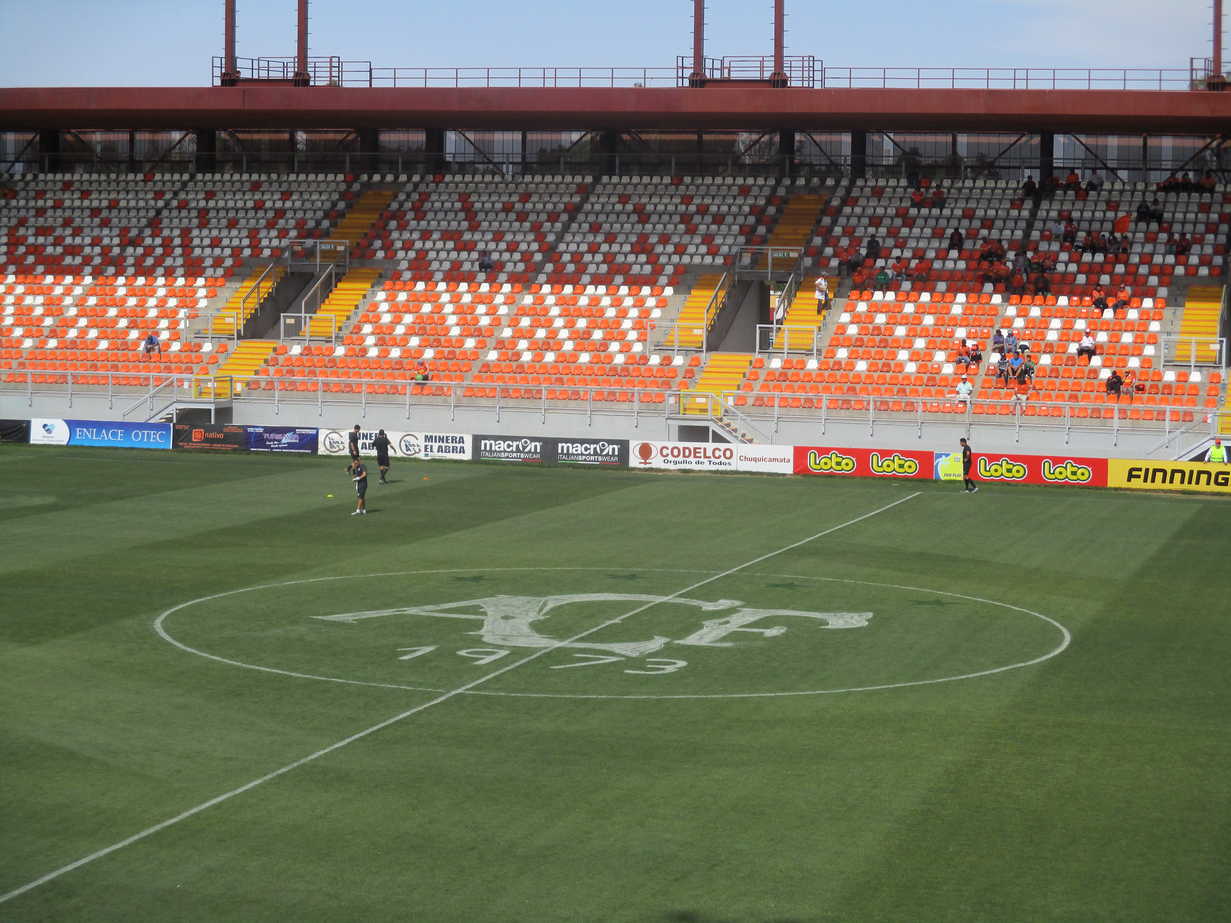 Tributo del equipo Club de Deportes Cobreloa en el Estadio Zorros del Desierto el día 4 de diciembre de 2016 hacía las victimas del vuelo LaMia Flight 2933